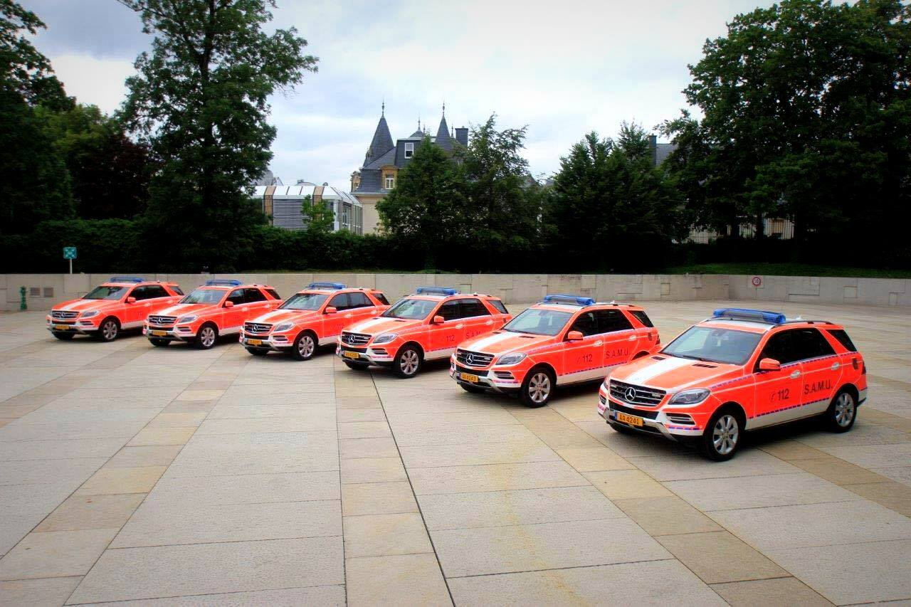 D'Mercedes-SAMUe bei der Iwwerreechung virum Stater Theater 2015